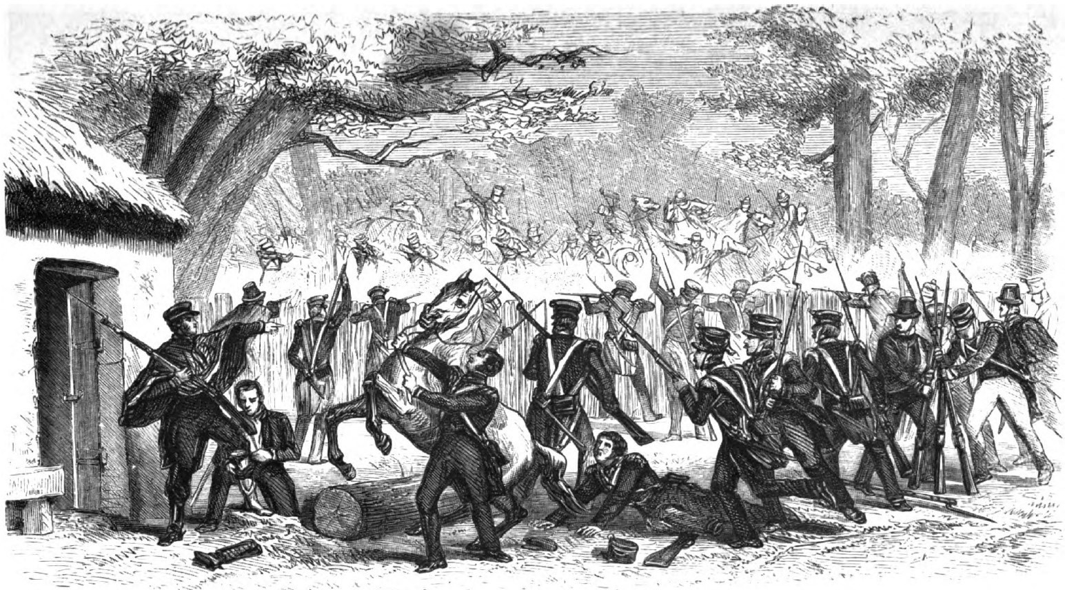 La Batalla del Roble se desarrolló en el paso del mismo nombre, sobre el río Itata, el 17 de octubre de 1813, es decir, en plena Patria Vieja chilena y dentro de los límites de la hacienda El Roble, que pertenecía a Clemente Lantaño; en ella se enfrentaron las fuerzas patriotas al mando del general en jefe José Miguel Carrera, compuestas de unos 800 hombres y una guerrilla realista al mando de Clemente Lantaño y de Luis Urrejola con 1.200 hombres. Imagen del libro “El ostracismo del General D. Bernardo O'Higgins” editado en 1860, cuyo copyright a expirado, pasando al dominio publico